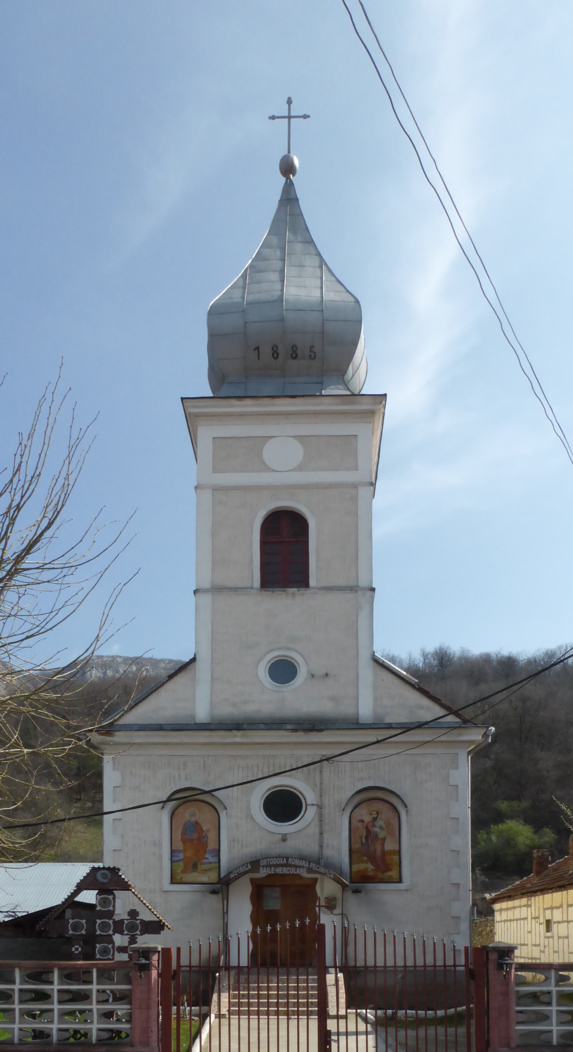 Kirche des Apostels Thomas in Pecinișca (Băile Herculane, RO).